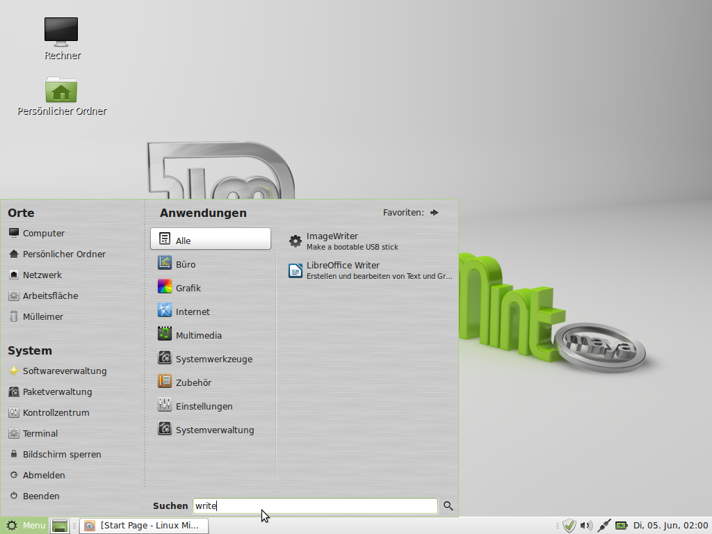 Bildschrimfoto von Linux Mint 13 (Maya) mit der Oberfläche MATE